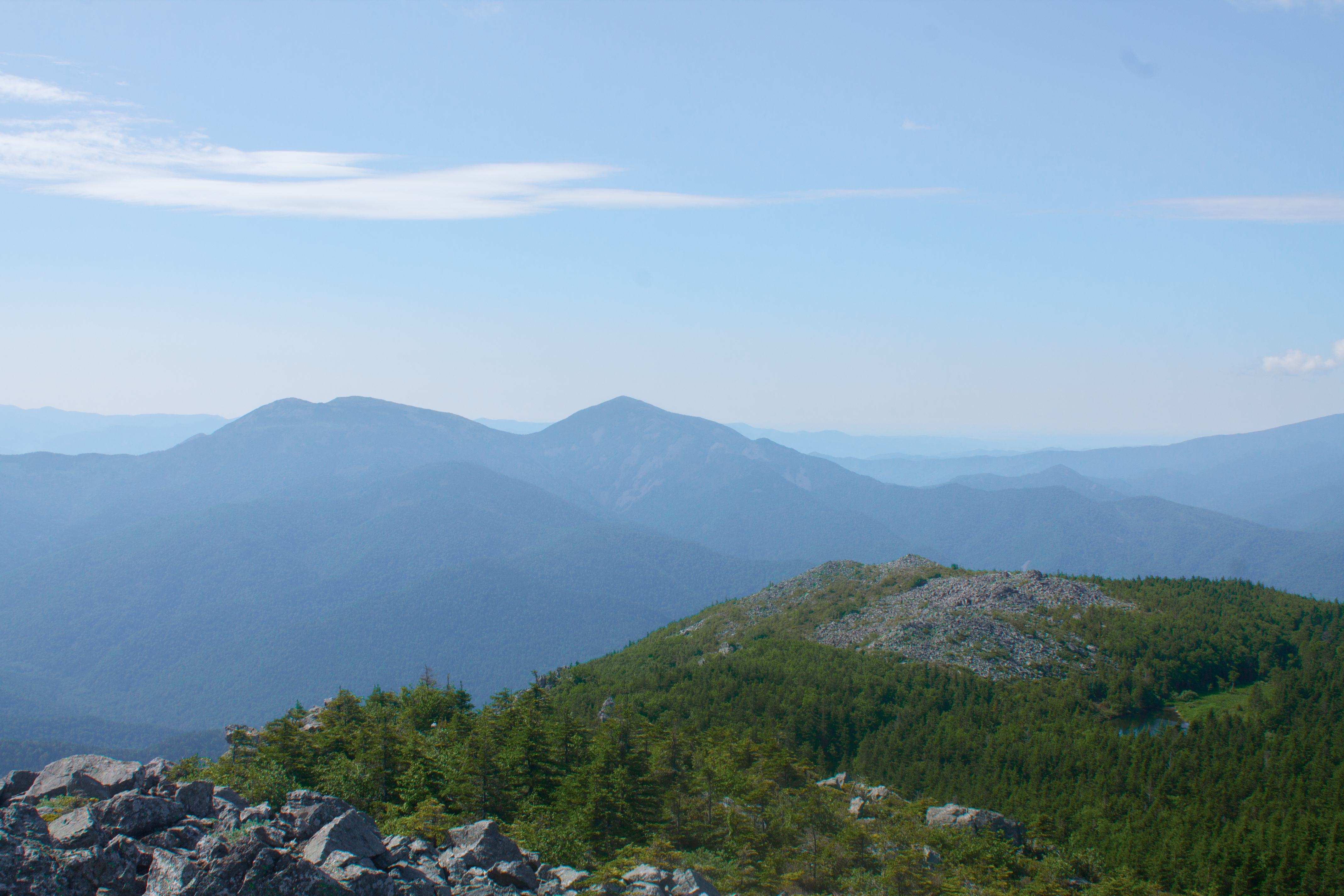 Гора Лысая (Приморский край) с Ольховой, снизу справа - озеро Алексеевское